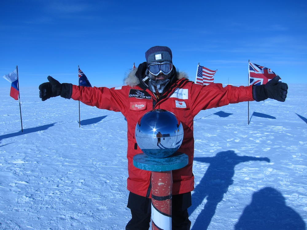 Llegada del Aventurero Albert Bosch al Polo Sur geográfico. Enero de 2012.